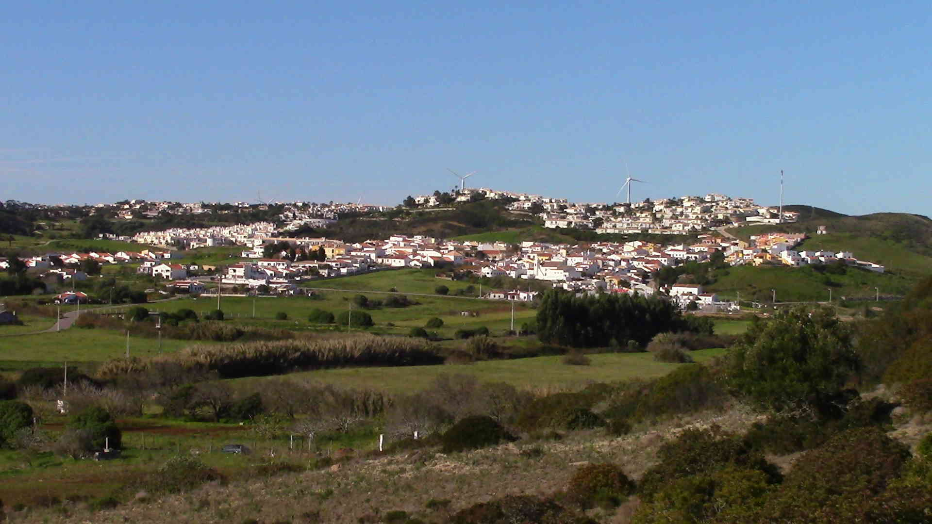 Aussicht auf Budens